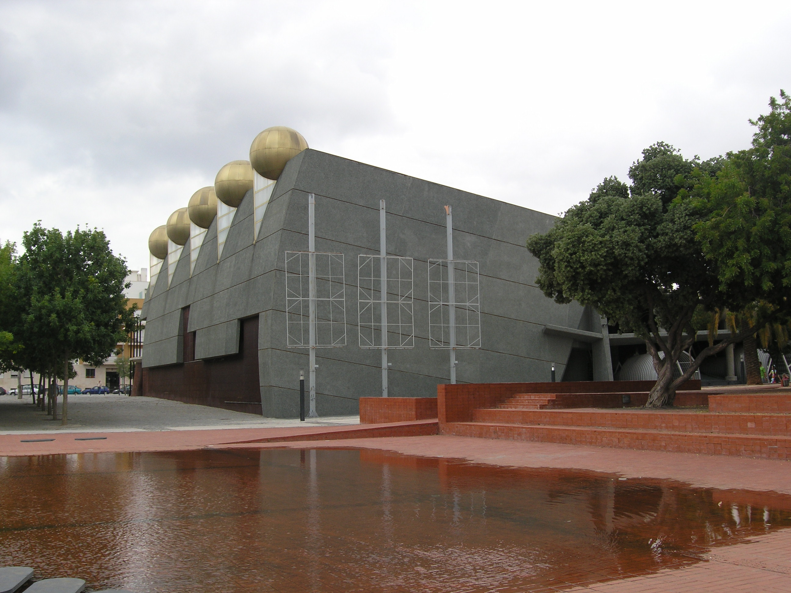 Pavilhao da Realidade Virtual, Lissabon